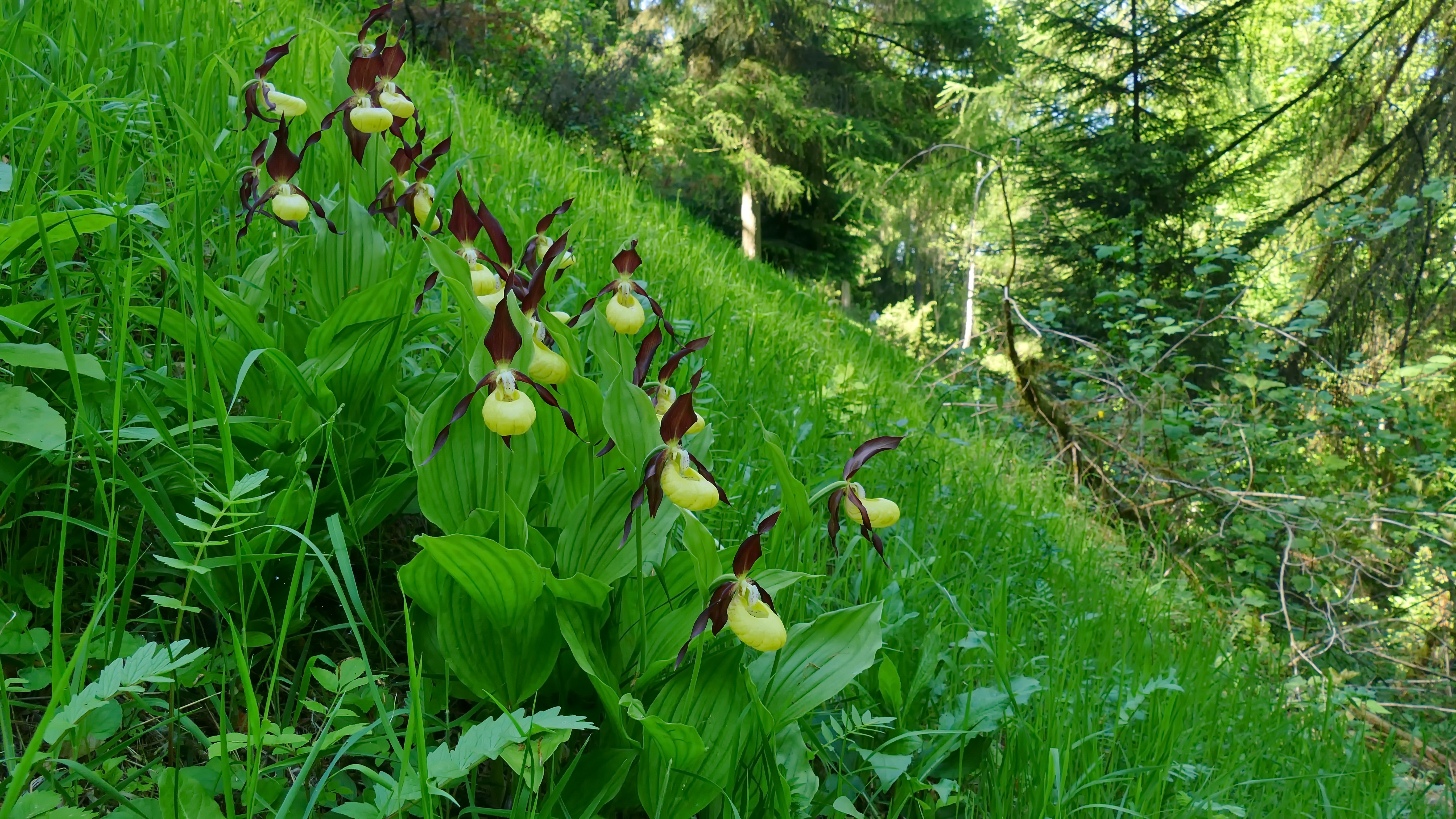 FFH-Gebiet „Burgberg, Heinsener Klippen, Rühler Schweiz“, Landschaftsschutzgebiet Solling-Vogler (LSG HOL 00015) und Naturpark Solling-Vogler:Auf einer als Ausflugsziel ausgeschilderten Wiese (bis 1935 eine Triftweide für die dörfliche Schaf- und Ziegenherde) wächst der Gelbe Frauenschuh (Cypripedium calceolus) in großer Zahl.